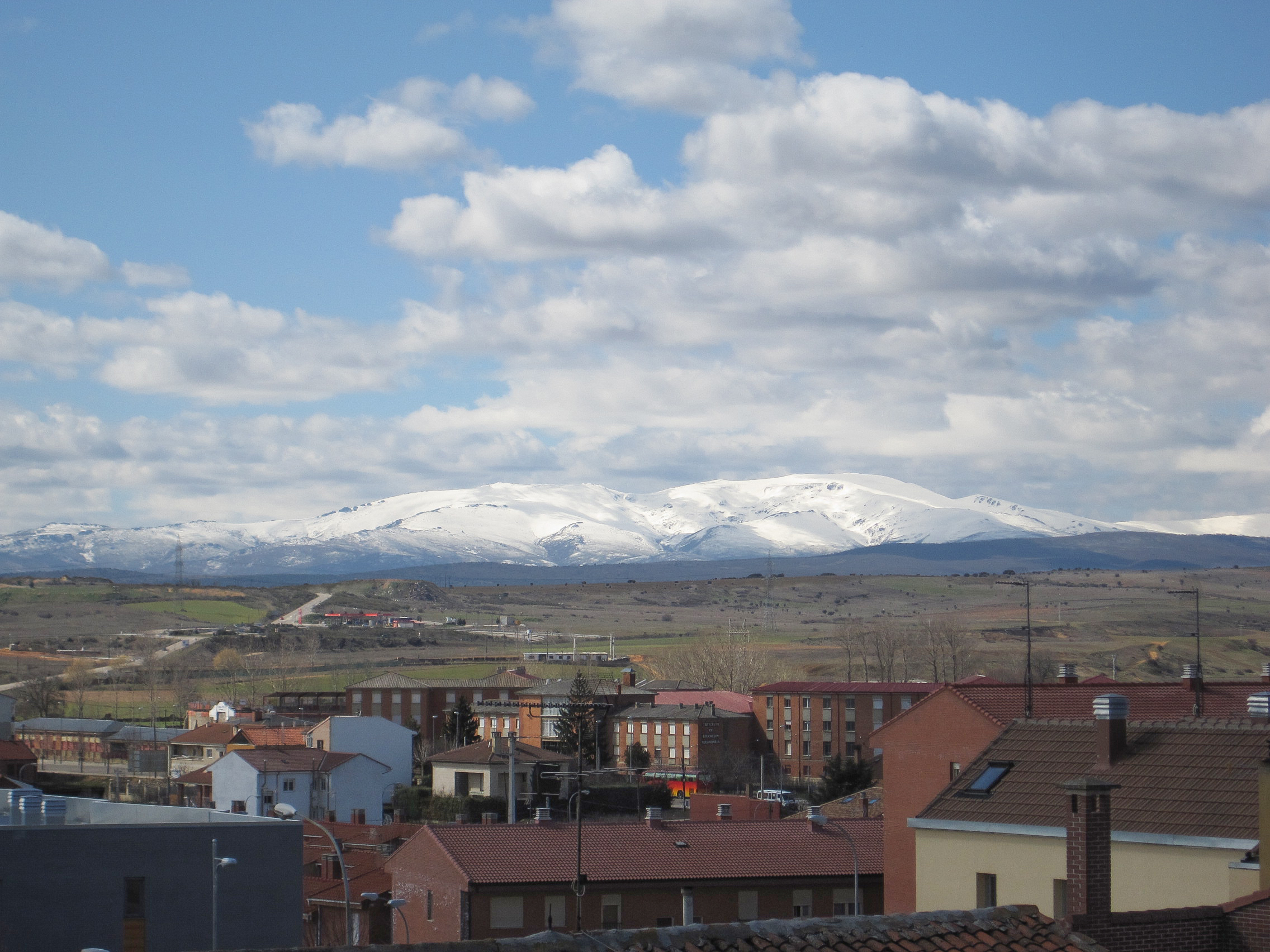 Vista del monte Teleno desde la ciudad de Astorga (León, España).